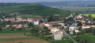 Fotka o Čelároch